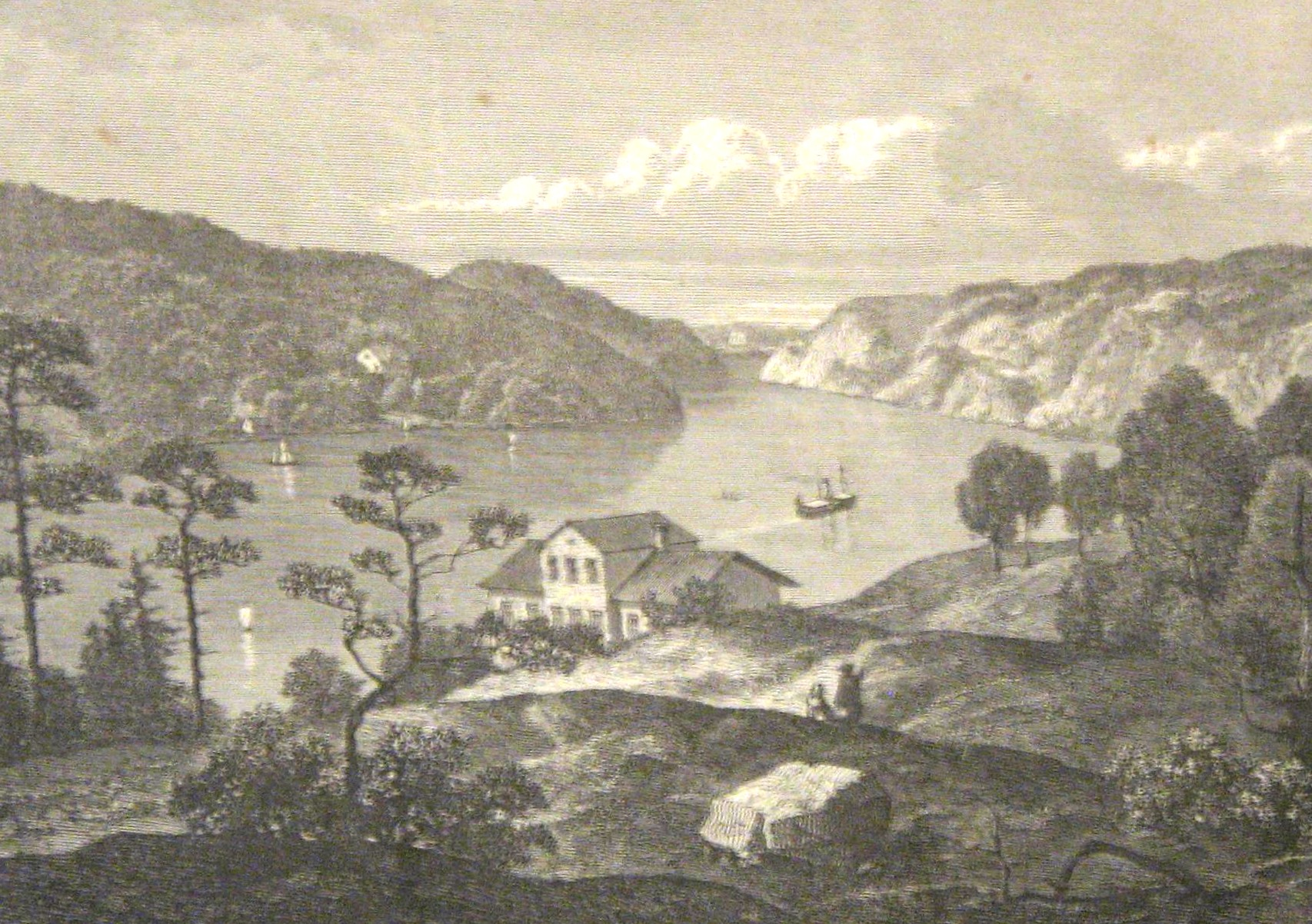 Xylografi ur Nordiska Taflor Pittoreska utsigter från Sverge, Norge och Damark i träsnitt med text, band 1, 1867